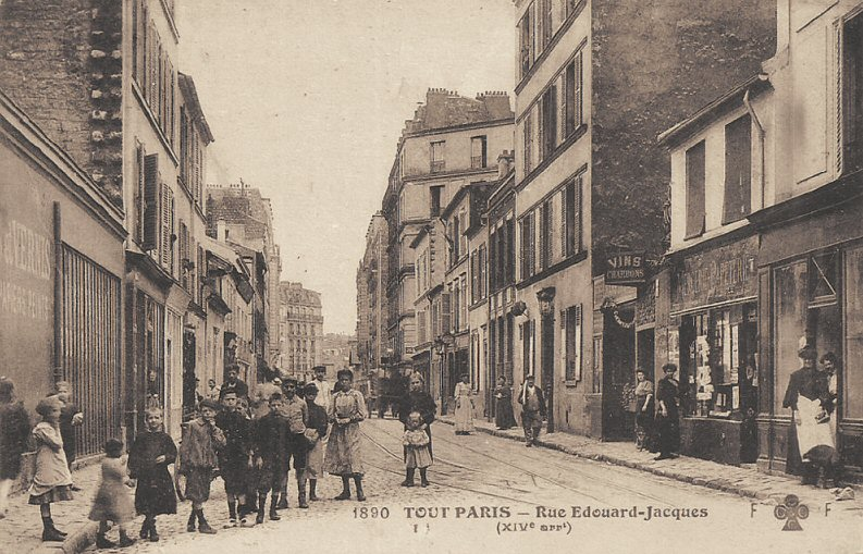 Vue de la Rue Edouard Jacques à Paris 14e en 1890